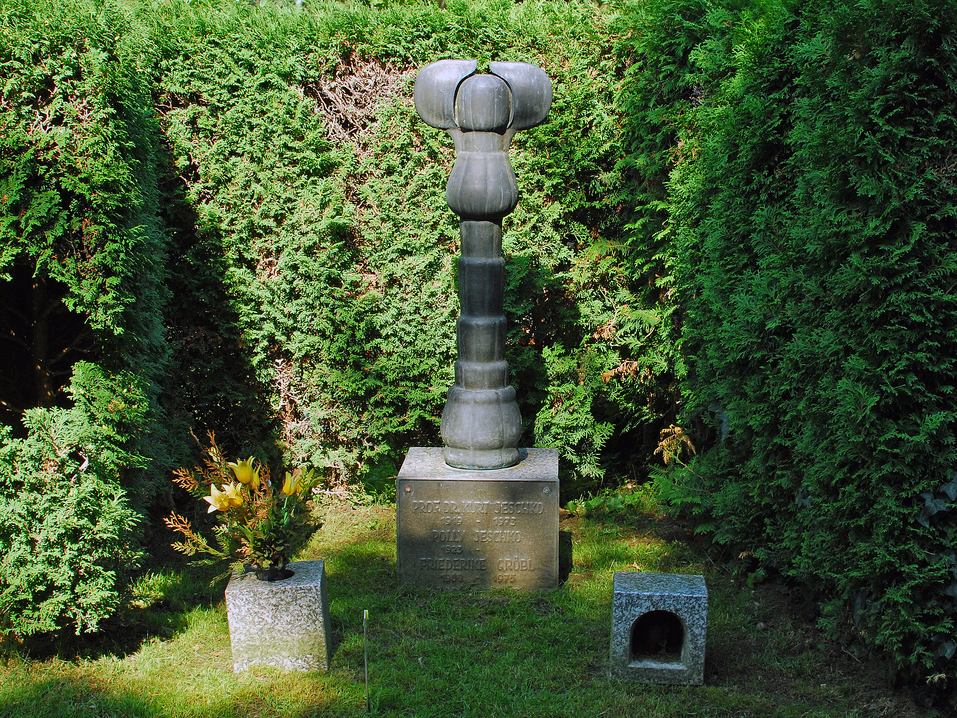 Dr. Kurt Jeschko, Sportjournalist und Fernsehmoderator, Urnengrab Wien Simmering